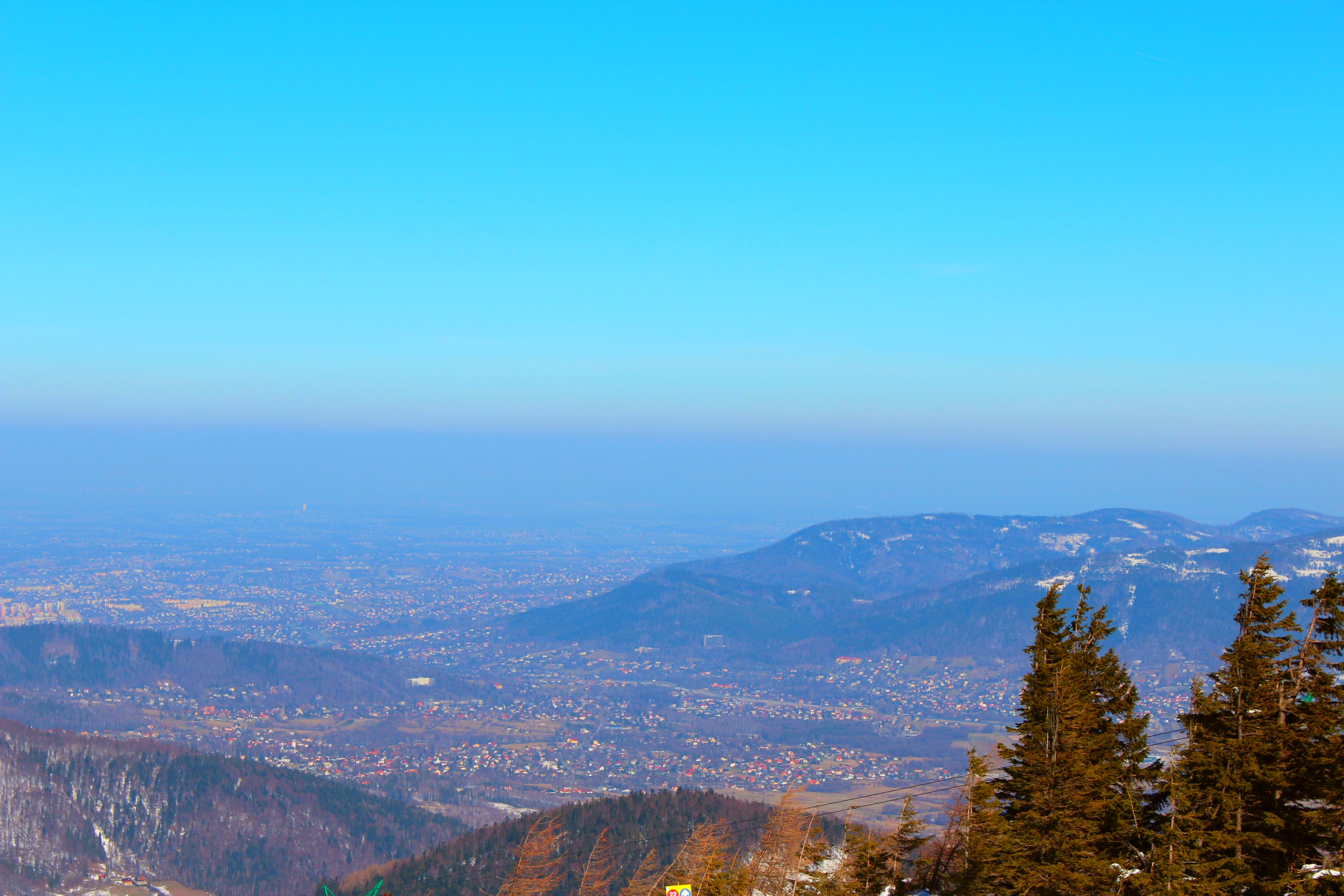 Widok ze Skrzycznego na Bielsko-Biała i Wilkowice.